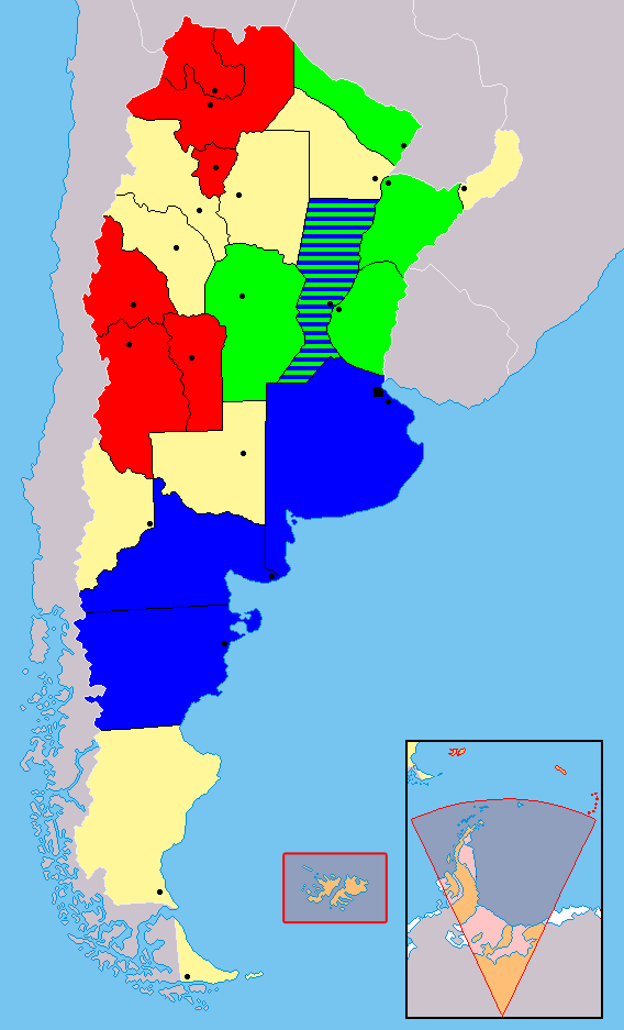 Distribución de los equipos del Torneo Argentino A Temporada 2007/08 por provincias y zonas, basado en Argentina - Político.png. Rojo para la Zona 1, verde para la Zona 2 y azul para la Zona 3.